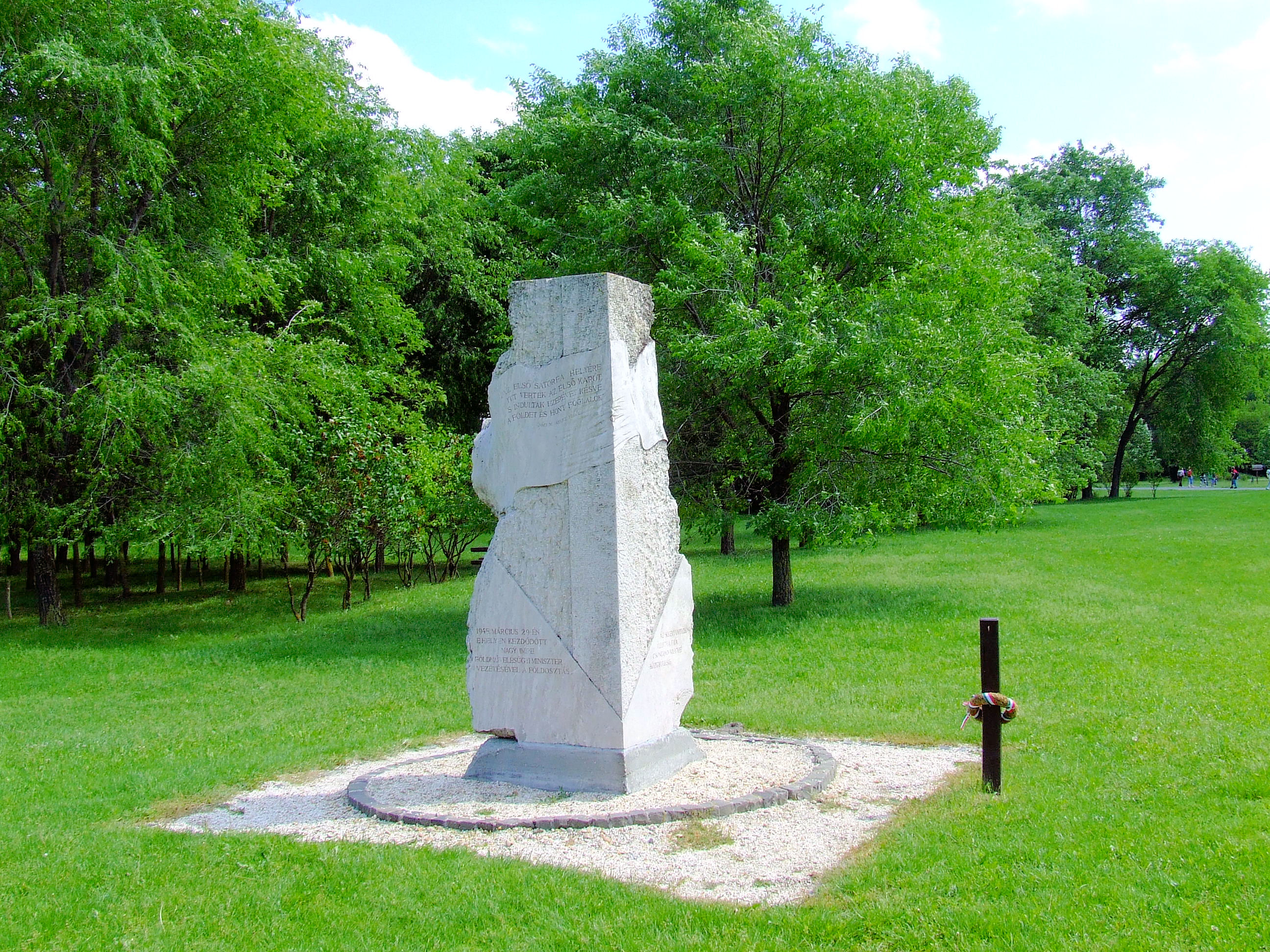 A Földosztási emlékmű Ópusztaszeren. 1945. március 9-én e helyen kezdődött Nagy Imre földművelésügyi miniszter vezetésével a földosztás (Popovics Lőrinc alkotása, 1995)